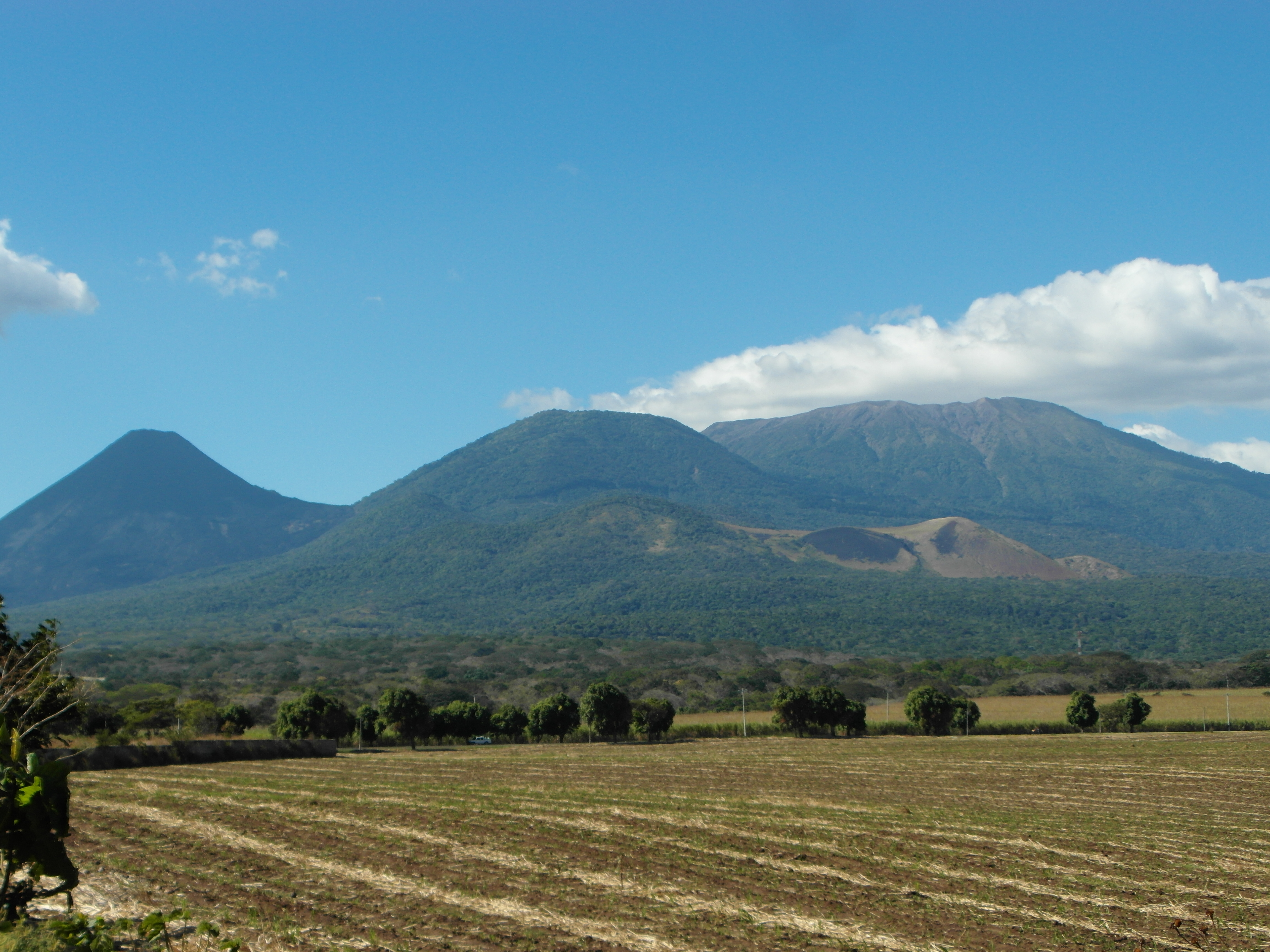 los tres volcanes al fondo